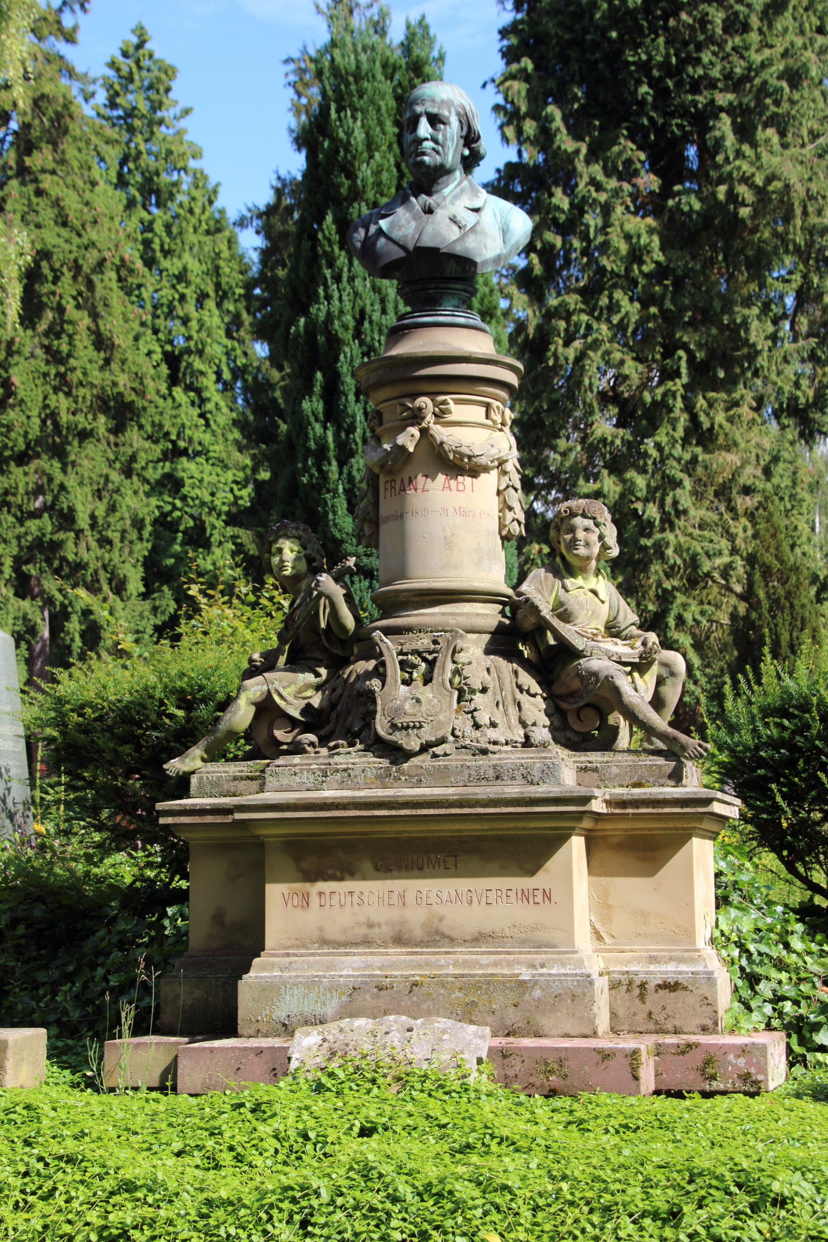 Grabmal Franz Abt (1819-1885). Bildhauer: Hermann Schies. Nordfriedhof Wiesbaden